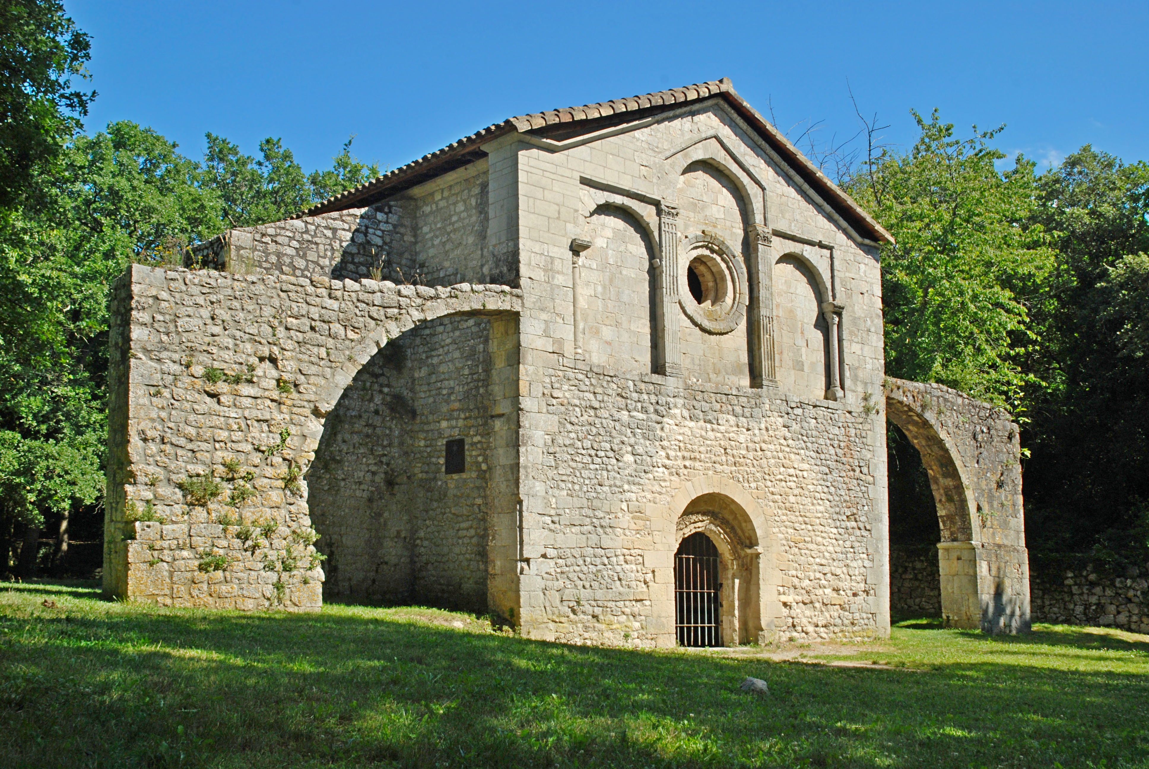 France - Drôme - Tricastin - Val des Nymphes